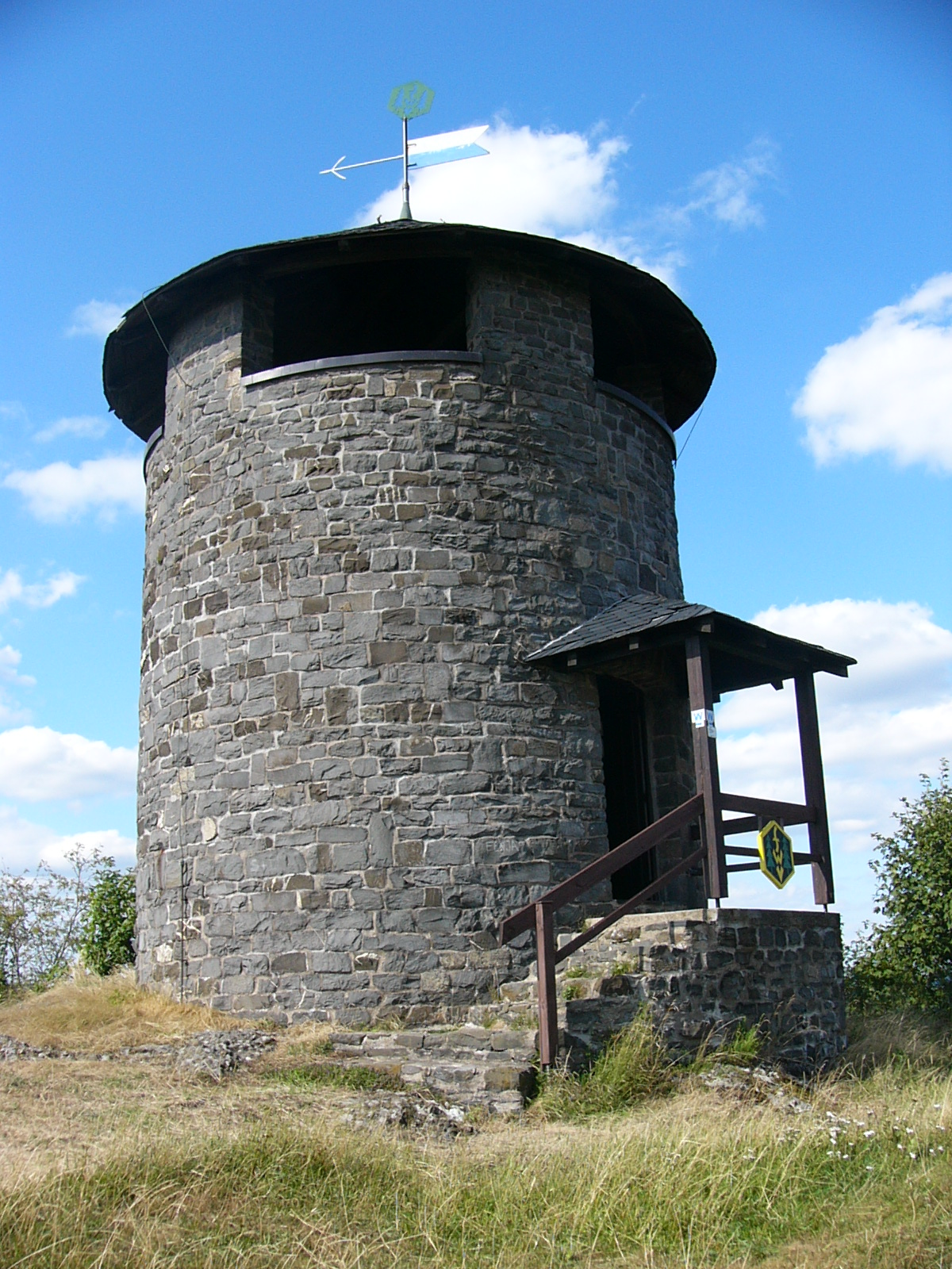 Ansicht von Frankenwarte und Umgebung